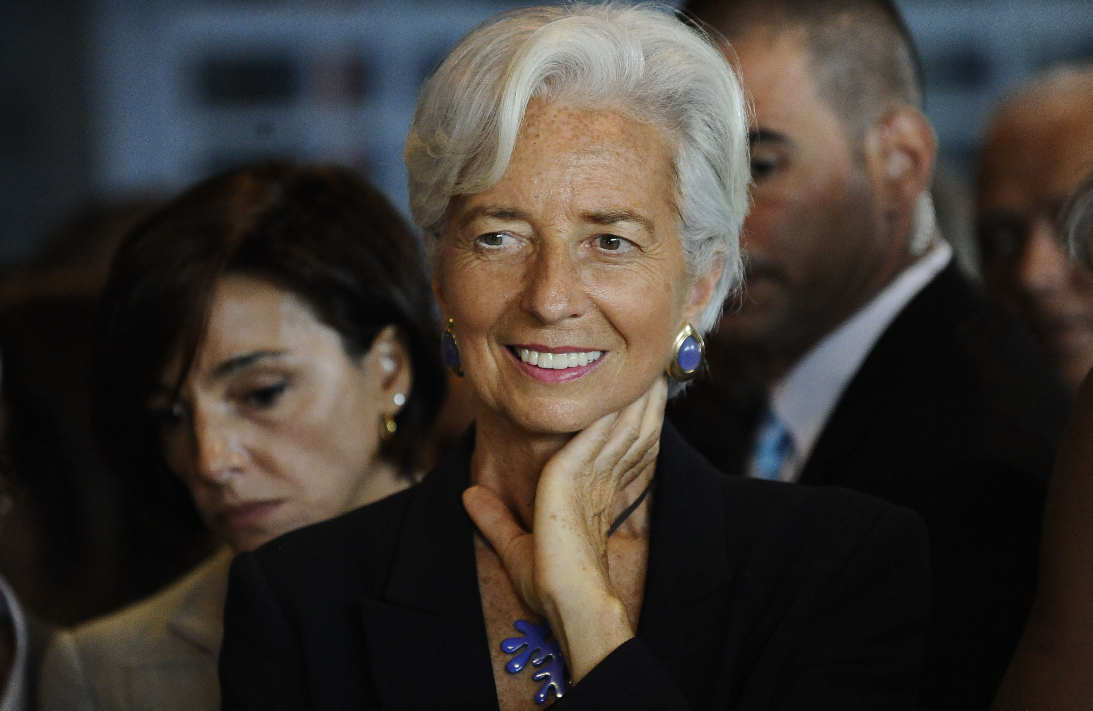 Christine Lagarde, diretora-geral do Fundo Monetário Internacional (FMI), durante visita ao Complexo do Alemão, no Rio de Janeiro